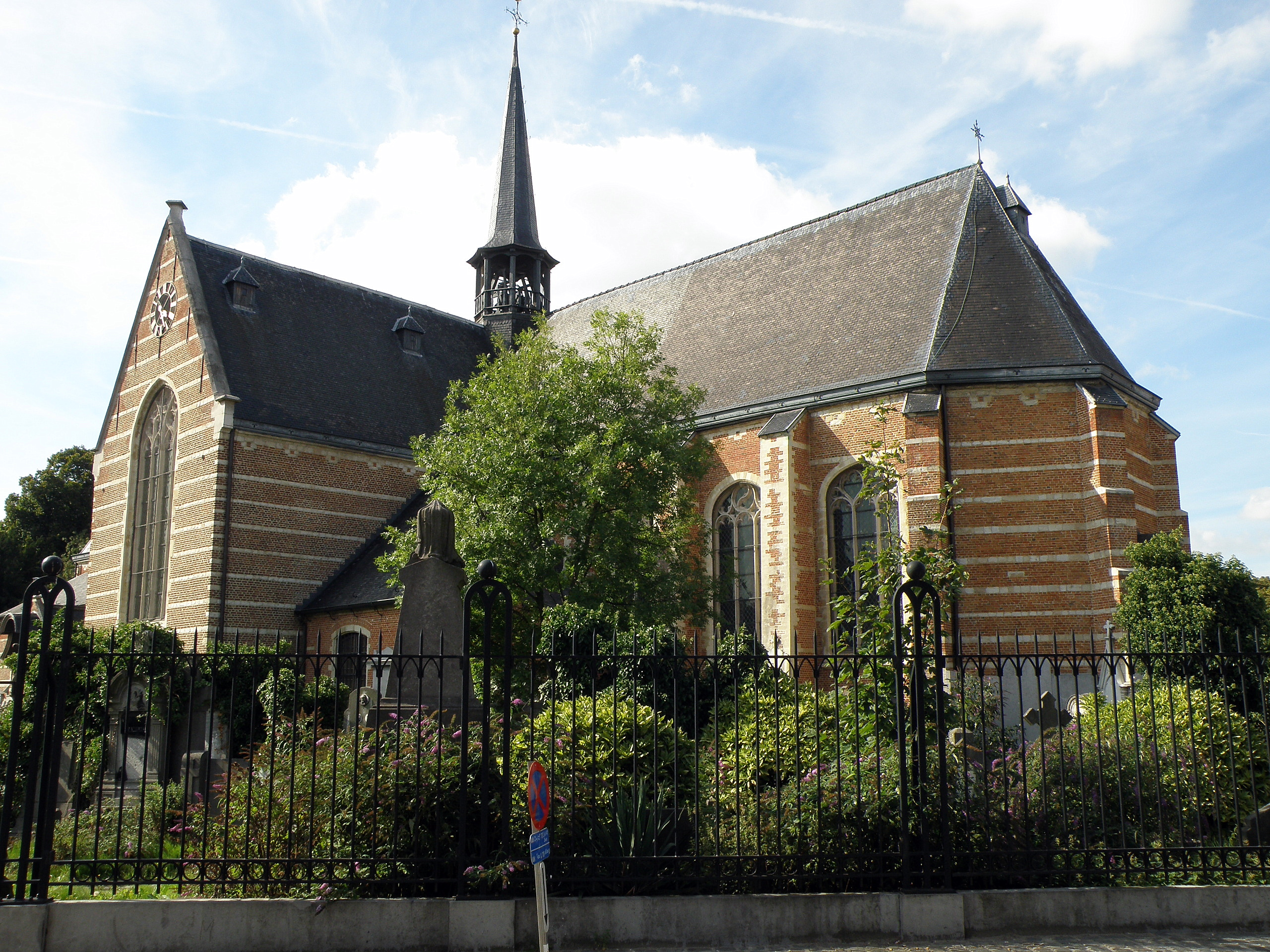 Anvers, Belgique. Église paroissiale Saint-Frédégand (en néerl. Sint-Fredeganduskerk), de style gothique tardif (XVIIe siècle), sise Lakborslei à Deurne-Nord, dans la proche banlieue nord-est d’Anvers. Baies néo-gothiques, avec entrelacs (fin XIXe). Entourée d’un monumental cimetière protégé au titre des MH. Bras sud du transept (à gauche), chœur avec abside à trois pans (à droite). Chevet agrandi vers 1700, en partie reconstruit vers 1760.